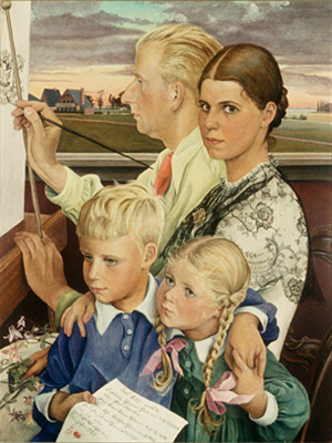 Self-portrait of Liselotte Schramm-Heckmannlabel QS:Len,"Self-portrait of Liselotte Schramm-Heckmann" label QS:Lde,"Selbstporträt der Künstlerin Liselotte Schramm-Heckmann"